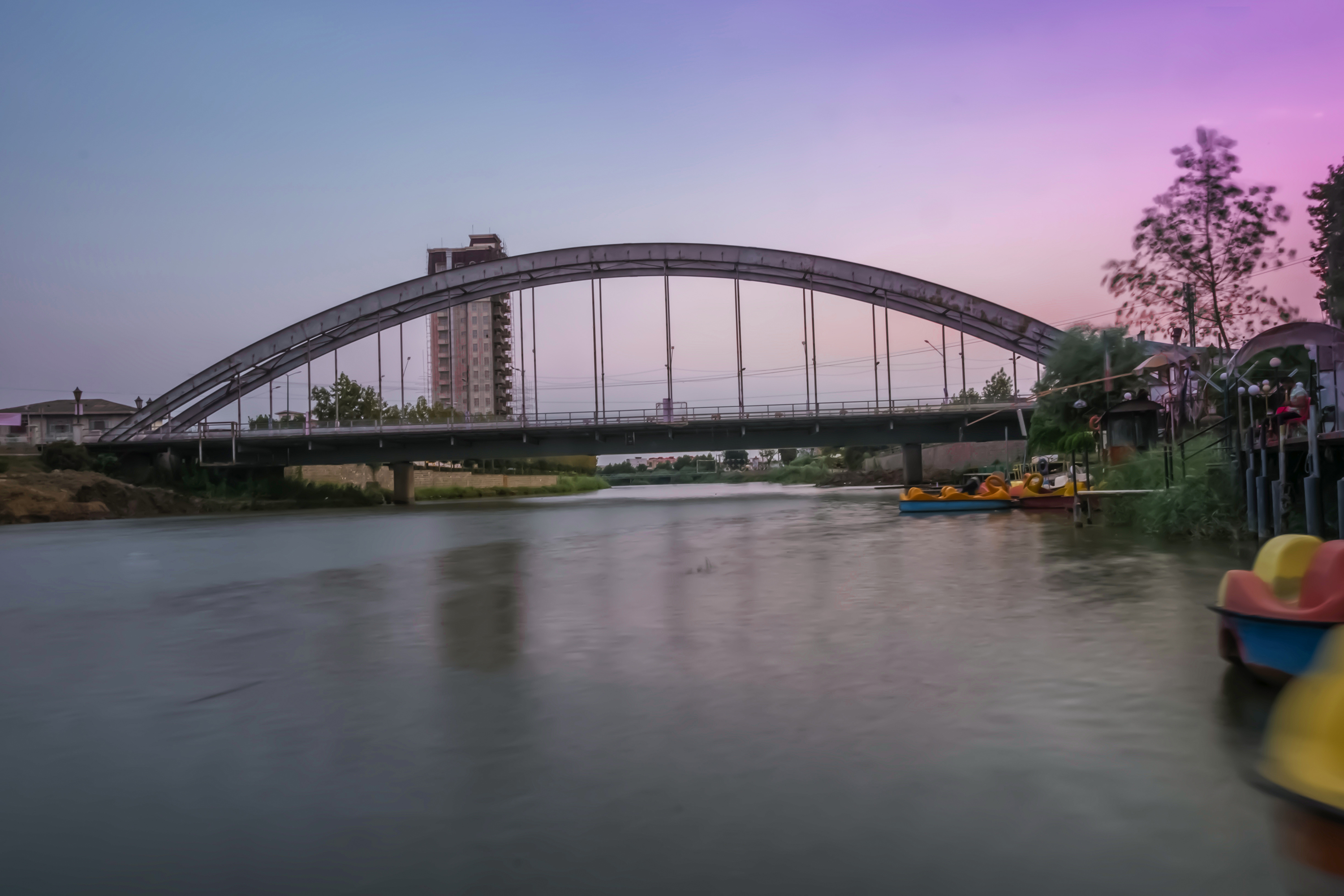 پل معلق بابلسر